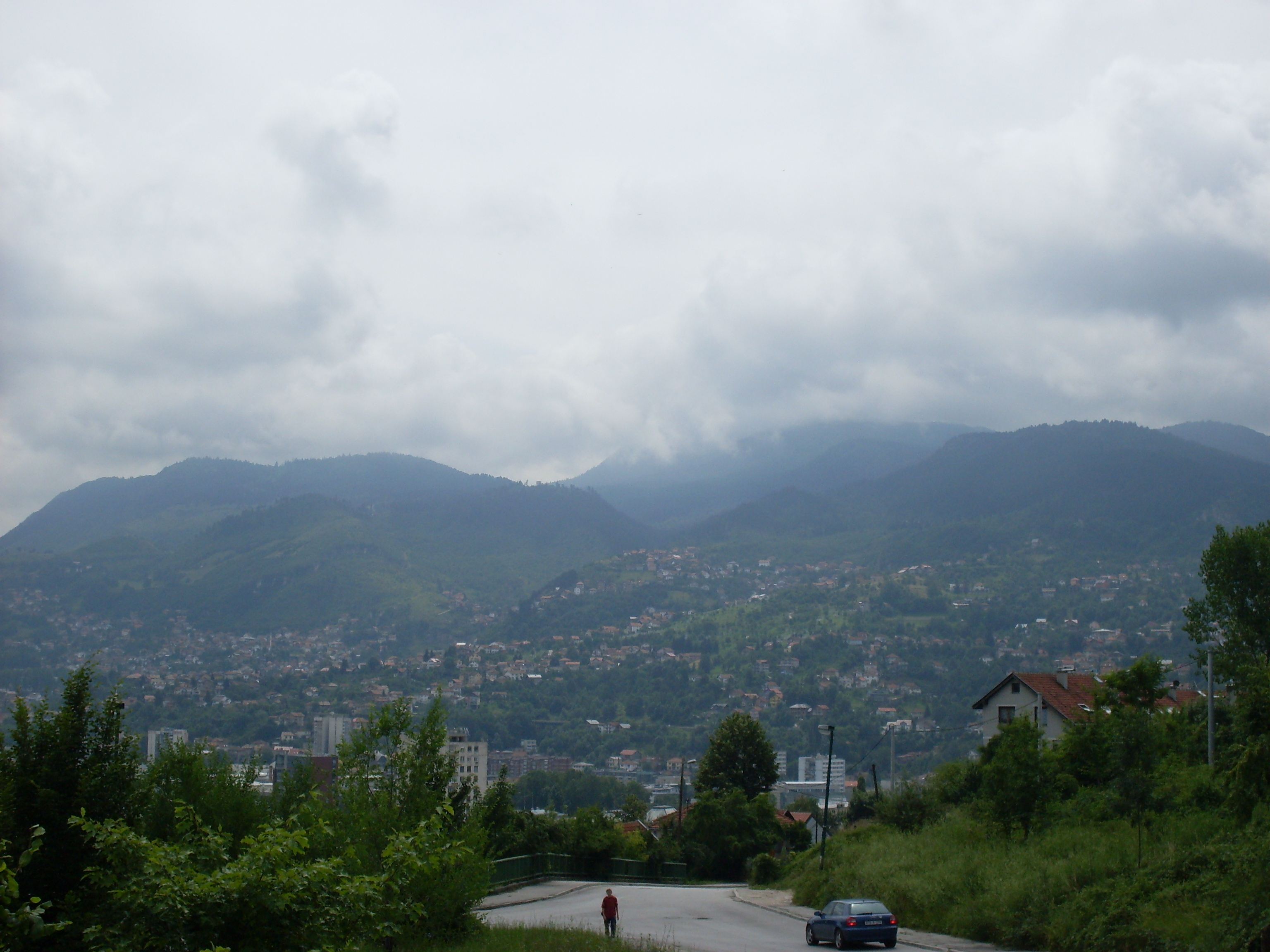 Trebević seen from Sarajevo